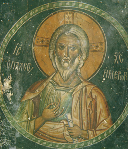 fresk z cerkwi pw. św. Stefana w Kastorii, XIIw.